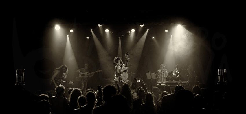 Astola y la banda de Rockallano presentando el disco en la sala Music Hall de Barcelona